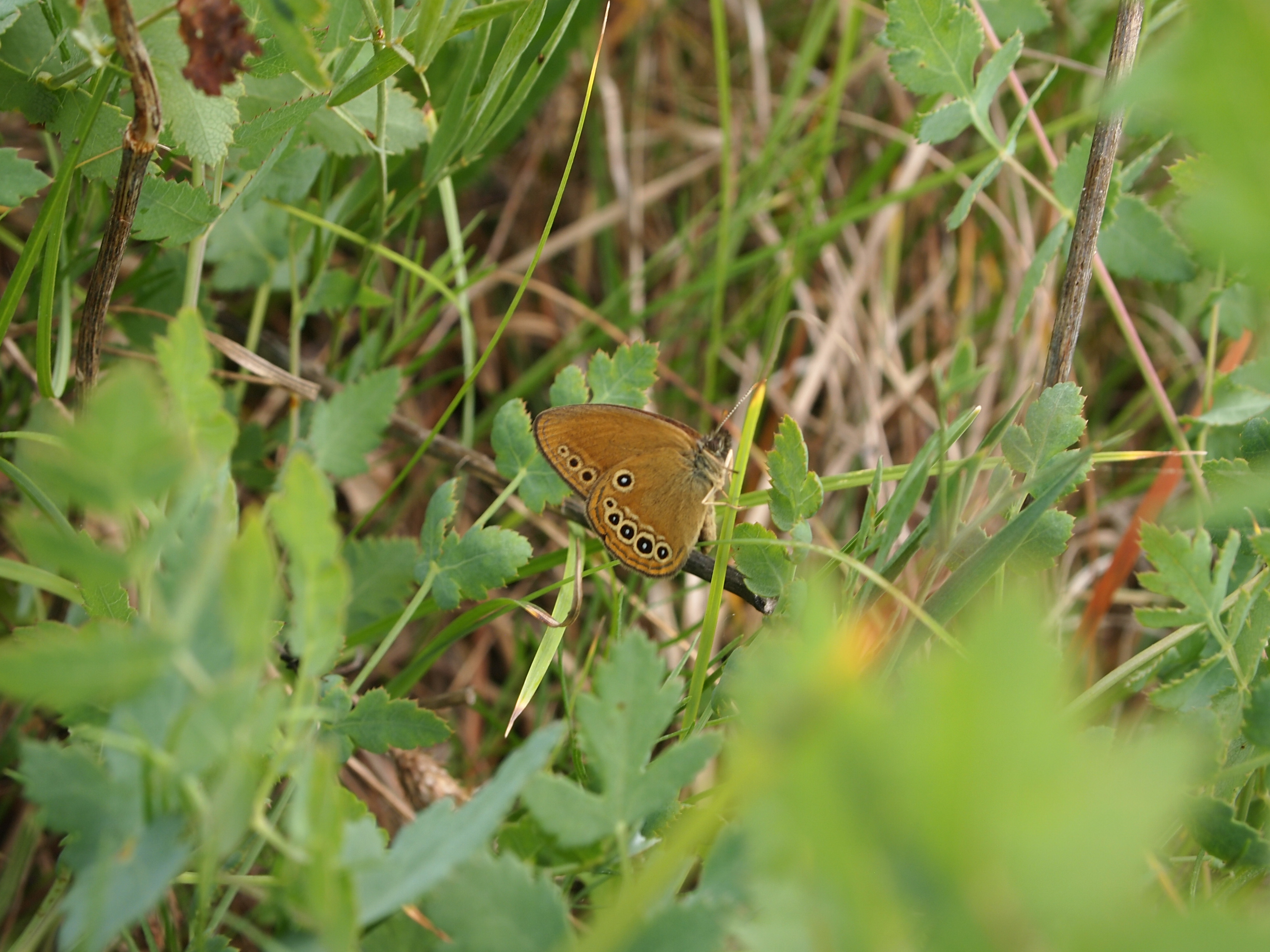 Fadet des laîches commune de Cherves-Richemont,sur la ZNIEFF forêt de Jarnac en Charente